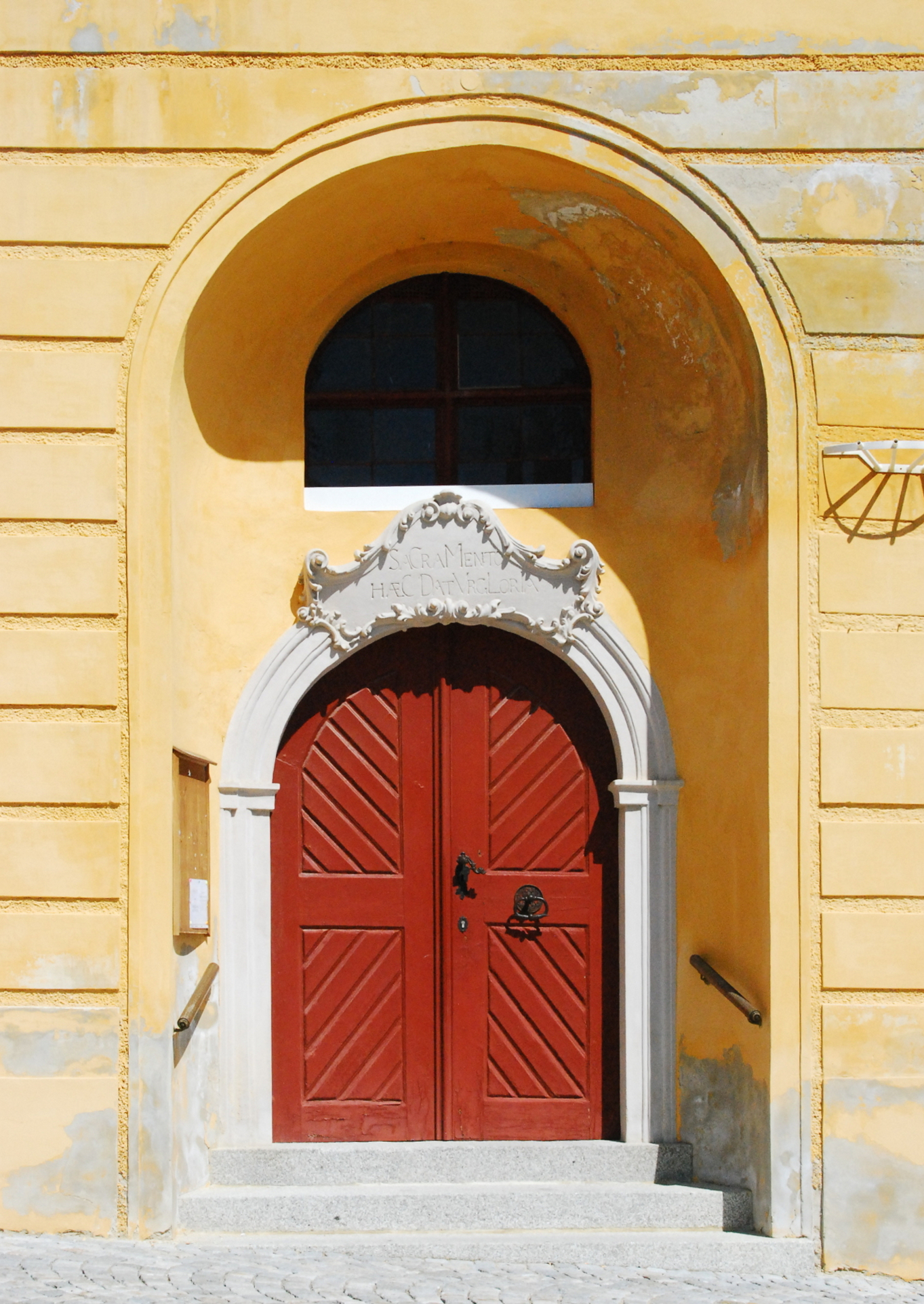 Eingang zur Rathauskapelle von Retz in Niederösterreich